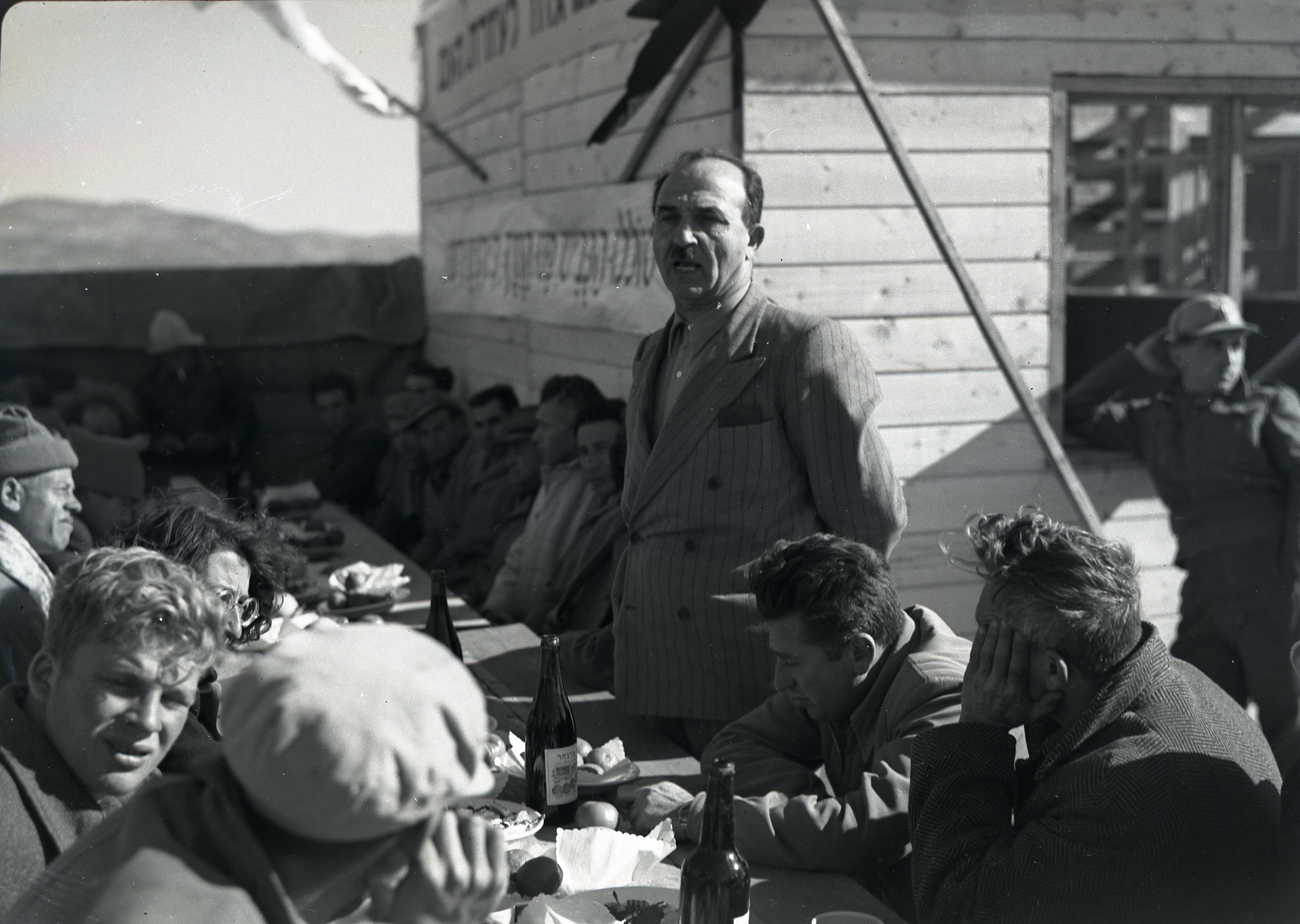 עליה לקיבוץ יסעור 4 צלם בנו רותנברג 1949 גנזך המדינה